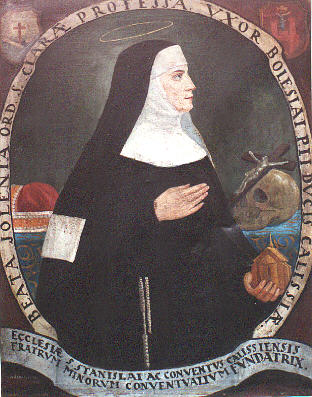 Portret Jolenty Heleny, błogosławionej Kościoła katolickiego